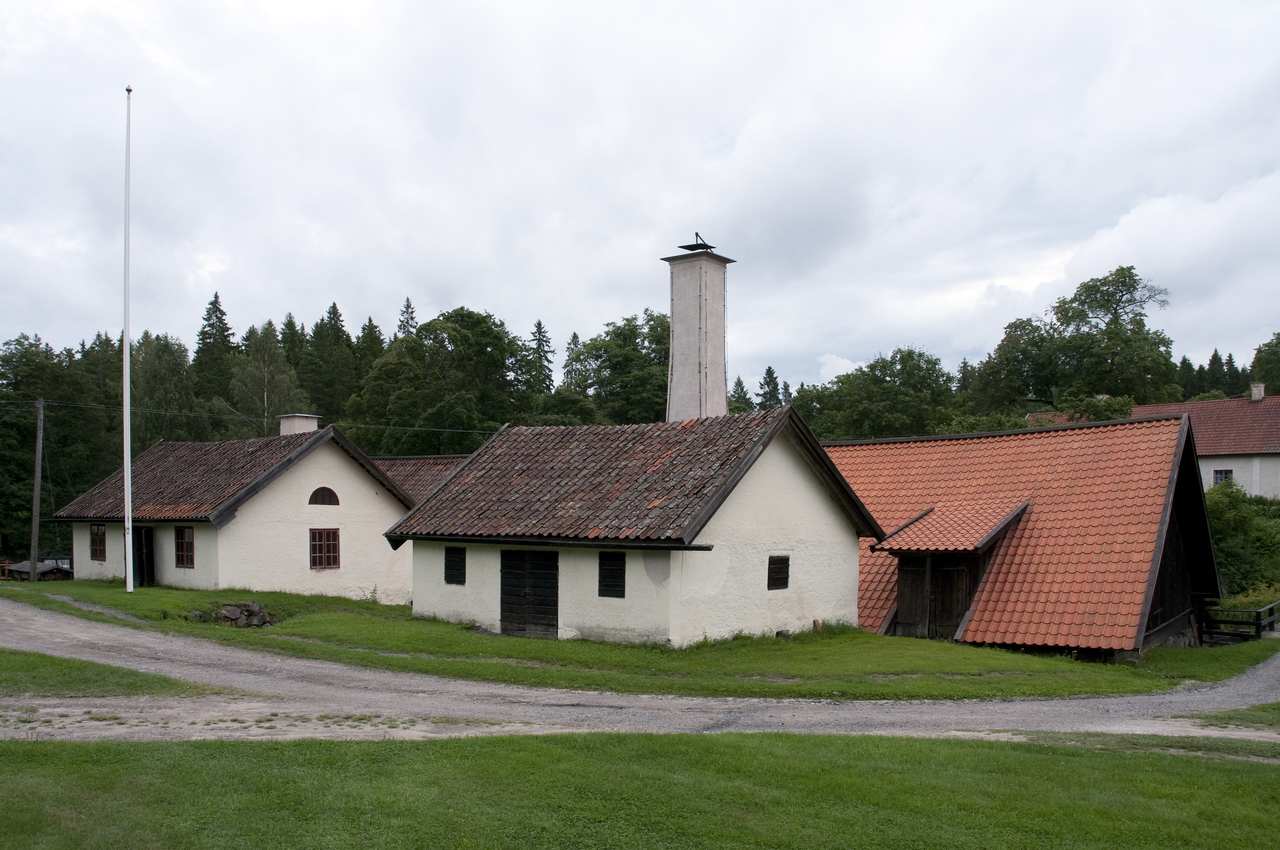 Övre Häfla bruk i Finspångs kommun.